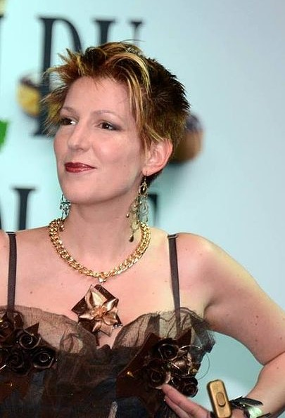 Natacha Polony au défilé de mode du salon du chocolat.